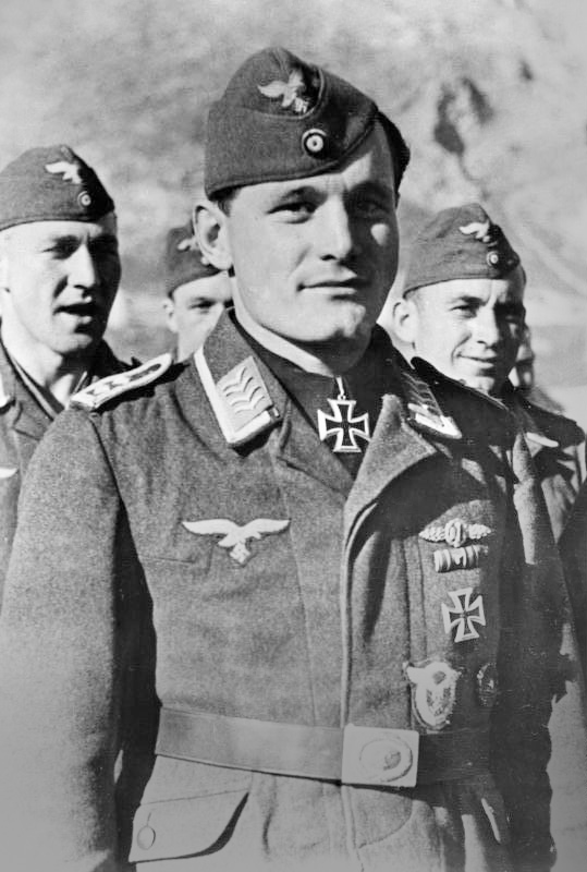 Richard Heller Scherl: Ritterkreuzträger, Oberfeldwebel Lw Richard Heller, Flugzfhr. in einem Zerst. Geschw., erhielt das R-K. am 23.9.41 PK-Wimmers, März 1942 2104-42 [Ritterkreuzträger Oberfeldwebel Richard Heller, Flugzeugführer in einem Zerstörer-Geschwader] Abgebildete Personen: Heller, Richard: Oberfeldwebel, Ritterkreuz (RK), Luftwaffe, Deutschland